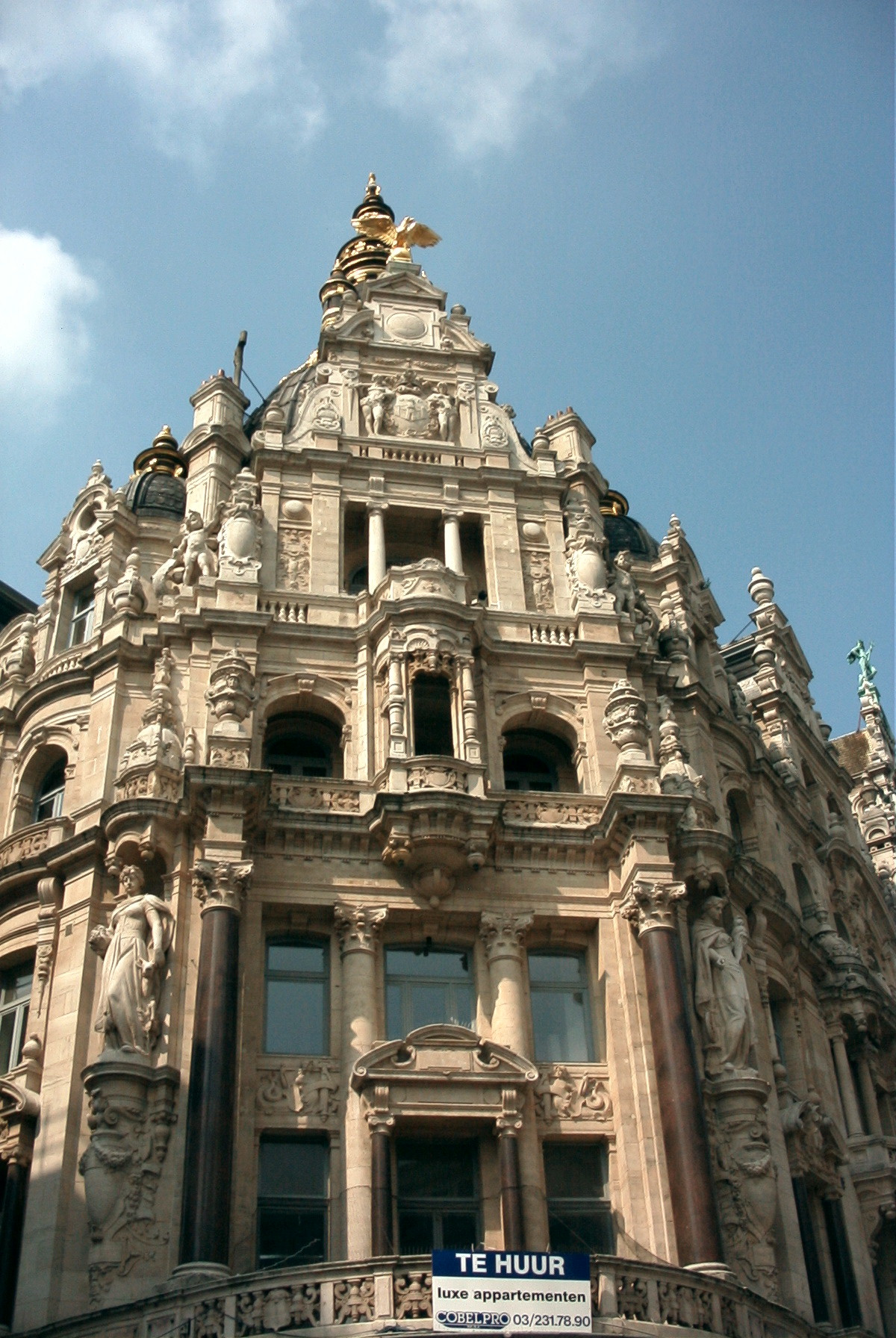 Antwerpeni épülethomlokzat